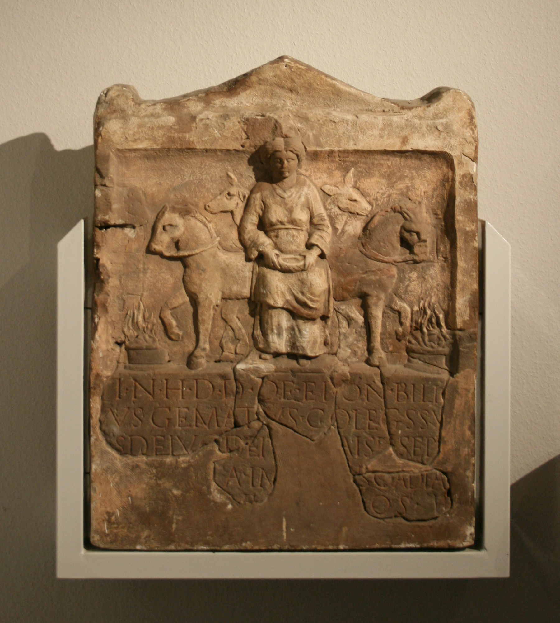 Epona-Relief aus dem Limeskastell Kapersburg im Wetterau-Museum in Friedberg. Inschrift: CIL XIII, 07438 zum Relief siehe CSIR-D-03-12, 00163.